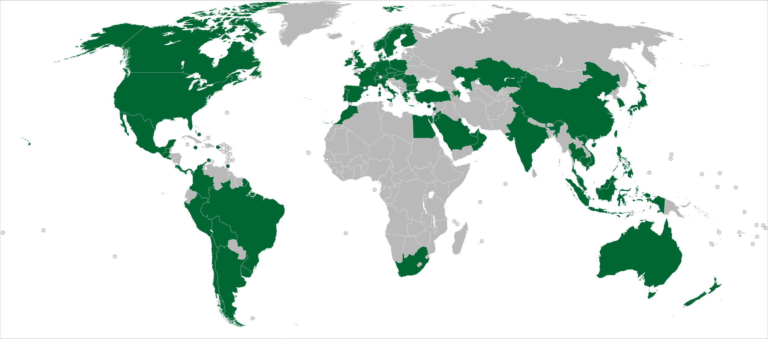 Karte der Länder mit Starbucks Coffee Shops